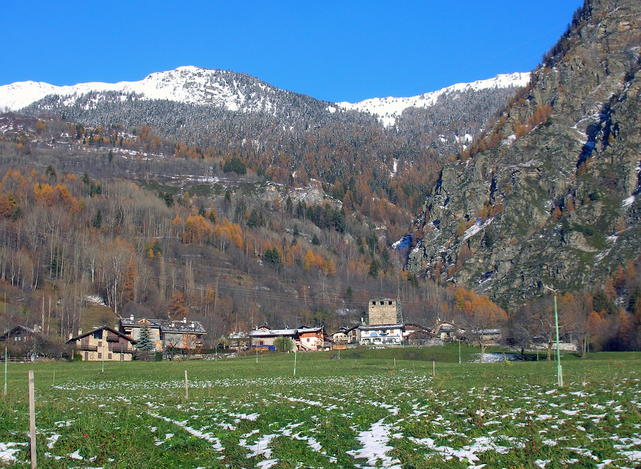 Castello di Ecours, La Salle, Valle d'Aosta, Italia